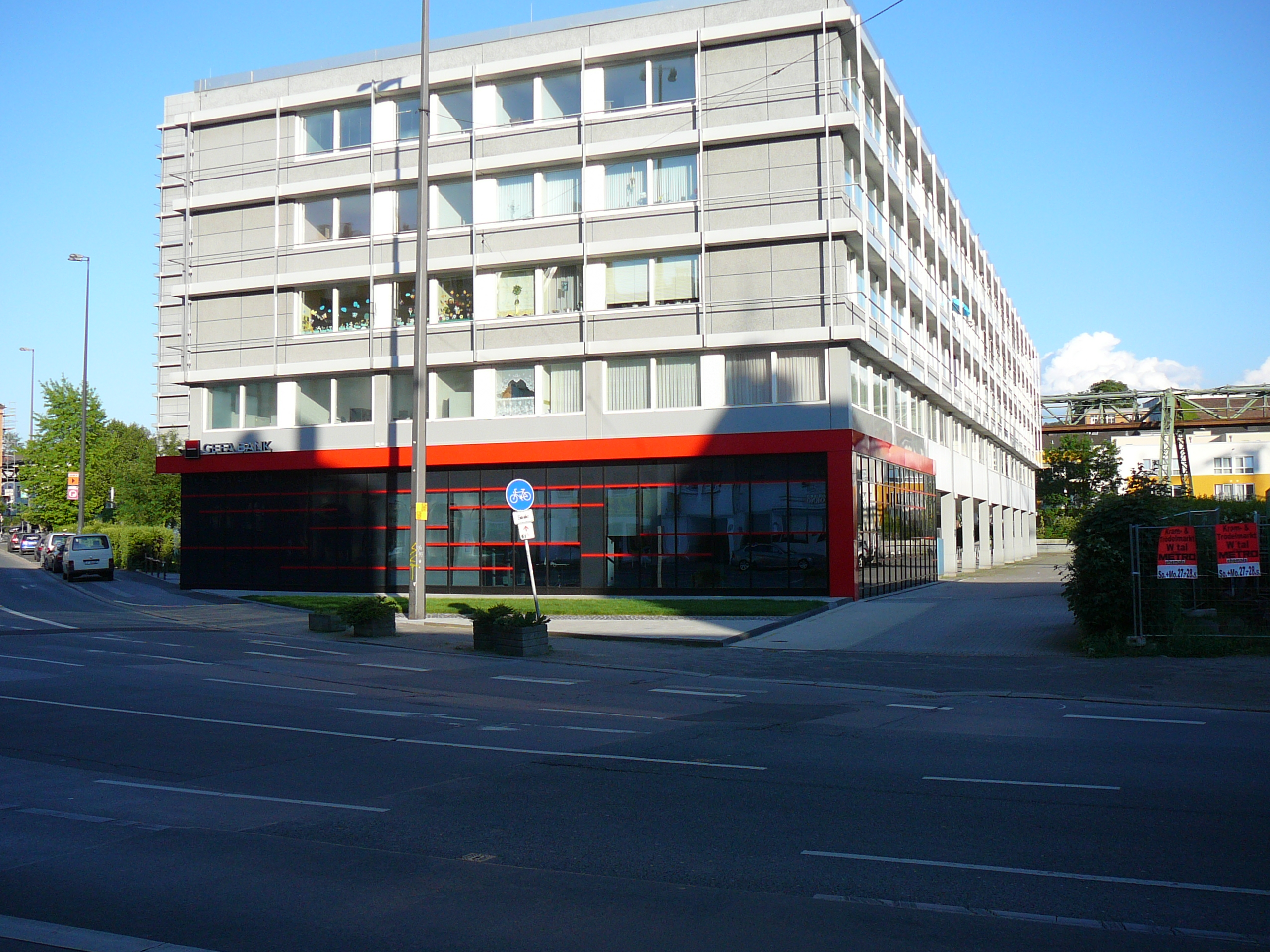 Friedrich-Ebert-Straße